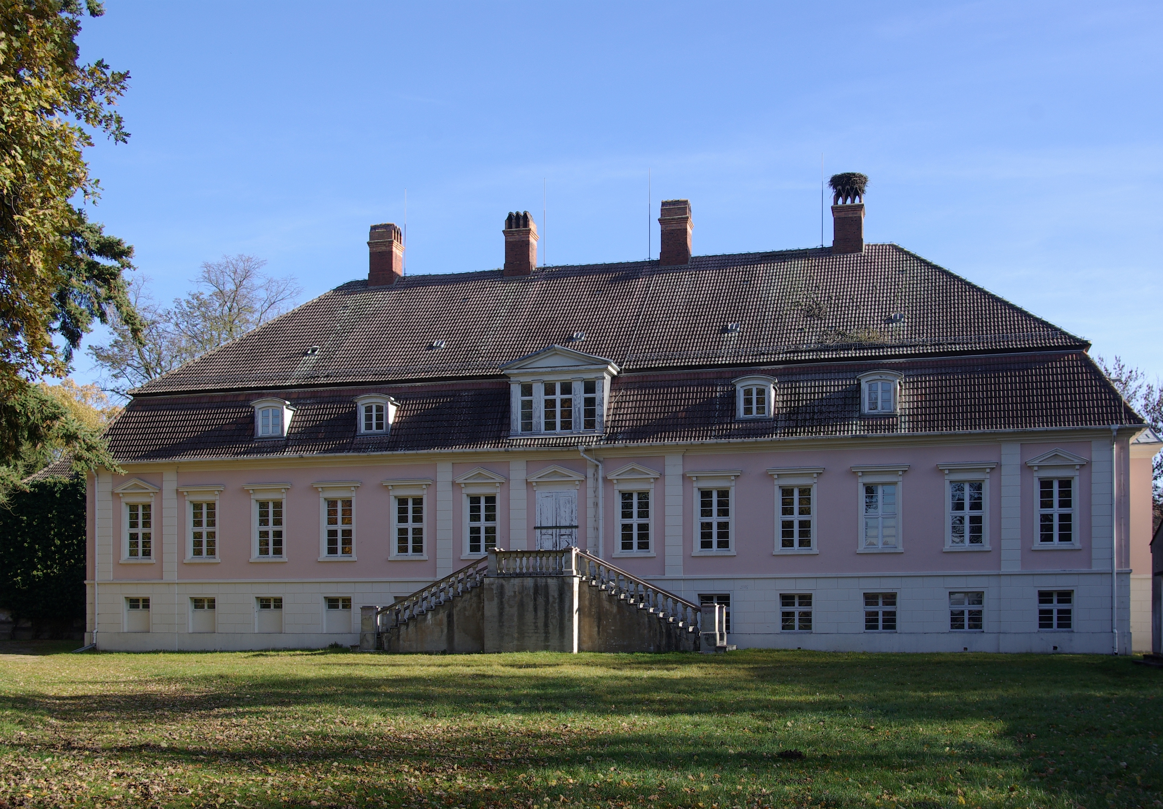 Kasel-Golzig in Brandenburg. Das Schloss wurde Ende des 18. Jahrhundert erbaut. Es steht unter Denkmalschutz.